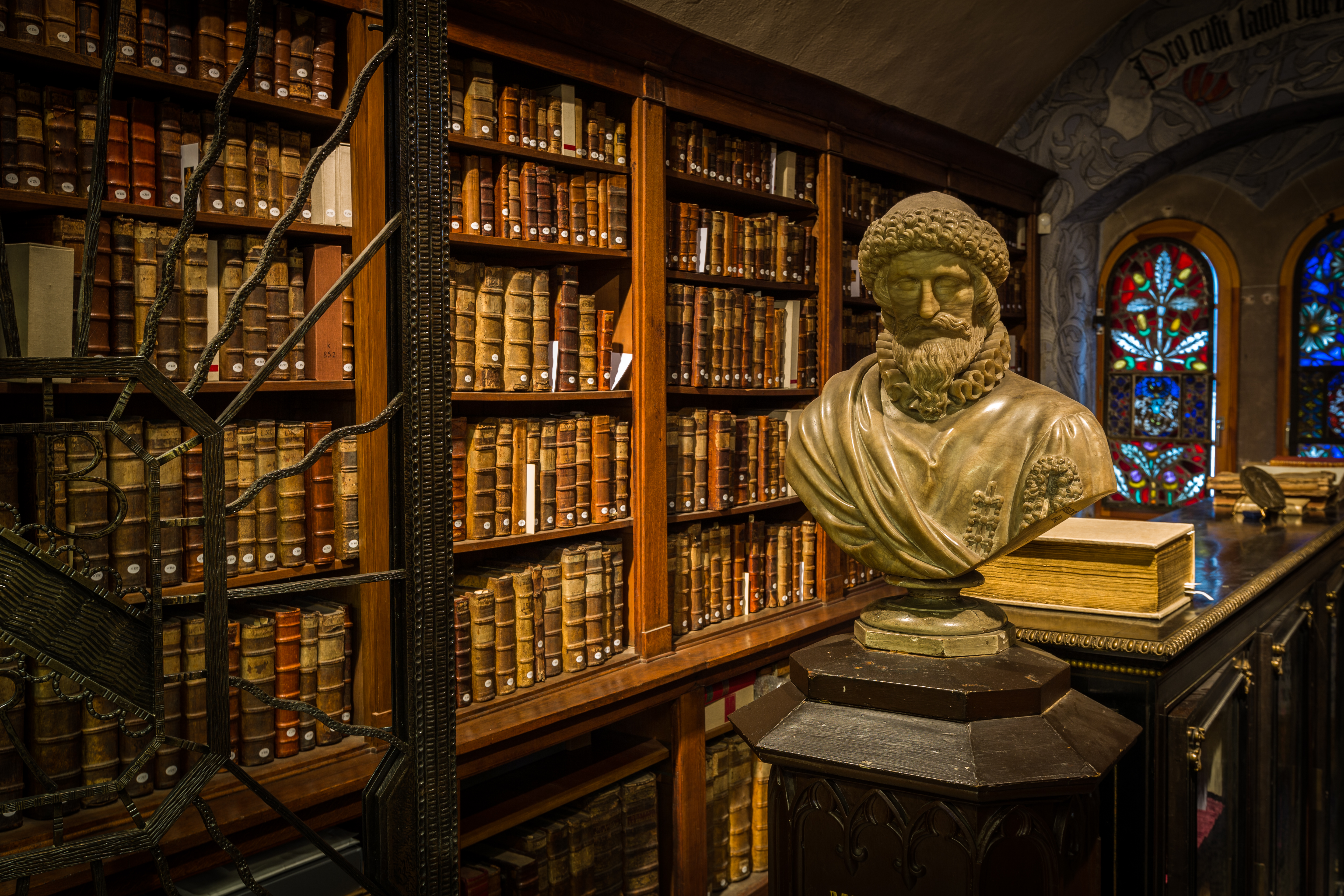 Jean Mentel, imprimeur et éditeur (1410-1478) Buste sur piédouche circulaire. Piédestal polygonal orné d'arcatures néogothiques trilobées terminées par un fleuron. Piédestal et piédouche en bois peint. Buste en ronde bosse et plaque en bas-relief en marbre. La plaque en marbre est fixée sur la façade du piédestal. Signature et date au revers du buste : SICHLER SC / 1842. Sur le piédestal, en lettres gravées et dorées : MENTEL DE SCHLESTADT INVENTEUR DE L'IMPRIMERIE. Au centre de la plaque en marbre, armoiries aux lions couronné de plumes surmontées d'une devise dans un phylactère : VIRTUTEM MENTE CORONAT. Sur le pourtour de la plaque en marbre, en lettres gothiques : Anno Christi millesimo quadringentesimo sexagesimo sexta / Insigne Scottorum Familiae / ab Friderico Rom Imp III Joan Mentelio / primo Typographiae Inventori ac fui concessam (L'an 1466, l'Empereur Frédéric III concéda les armoiries de la famille Schott au premier inventeur de la typographie). Coll. Bibliothèque humaniste de Sélestat. This object is classé Monument Historique in the base Palissy, database of the French furniture patrimony of the French ministry of culture, under the references PM67001839 and IM67008672.